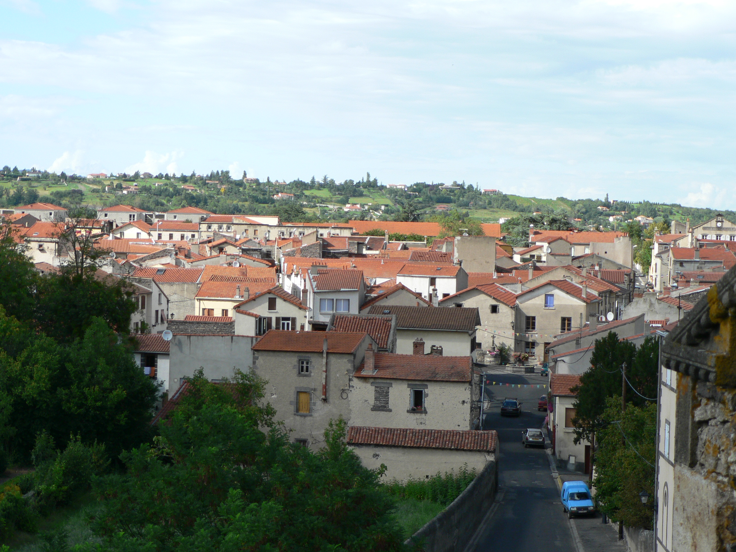 Vue du centre bourg de Mozac (63 - France), depuis le clocher de l'église